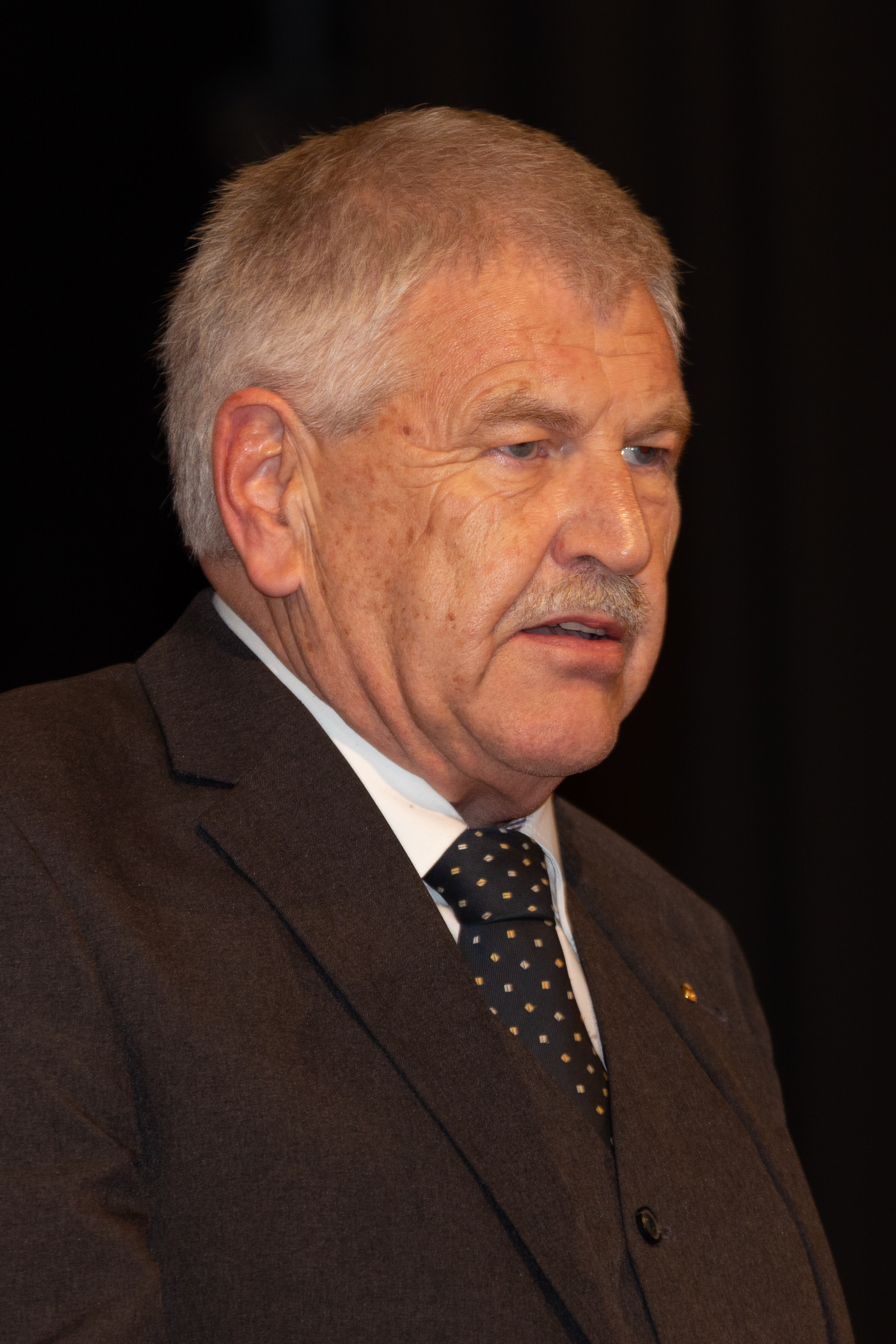 Udo Voigt (* 14. April 1952 in Viersen) ist ein deutscher rechtsextremer Politiker der Nationaldemokratischen Partei Deutschlands (NPD). Von 1996 bis 2011 war er NPD-Parteivorsitzender, seit 2014 ist er Mitglied des Europäischen Parlaments.